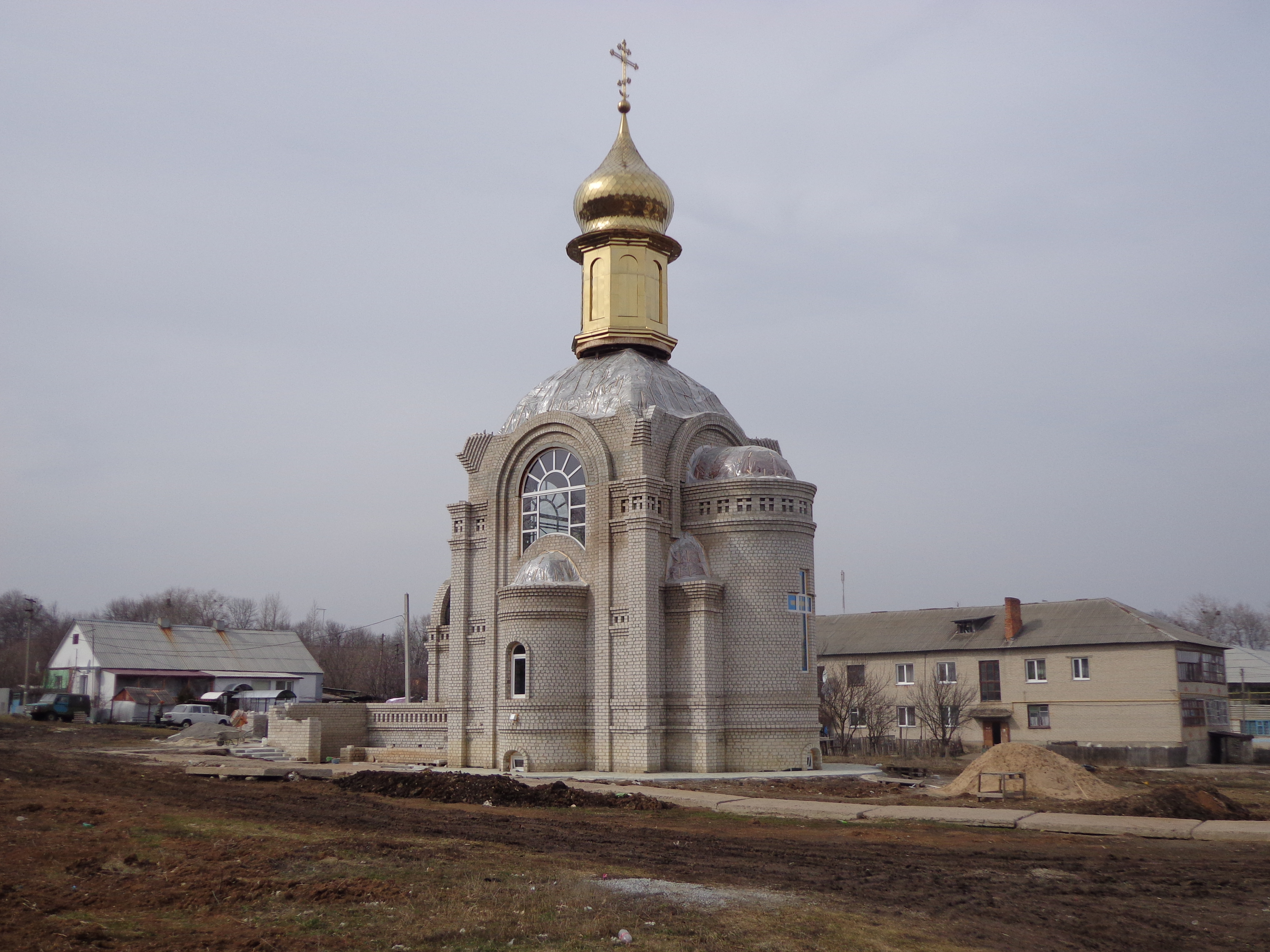 Строящаяся церковь пос. Лесное, Дергачёвский р-н, Харьковская обл. Состояние на апрель 2013 года.